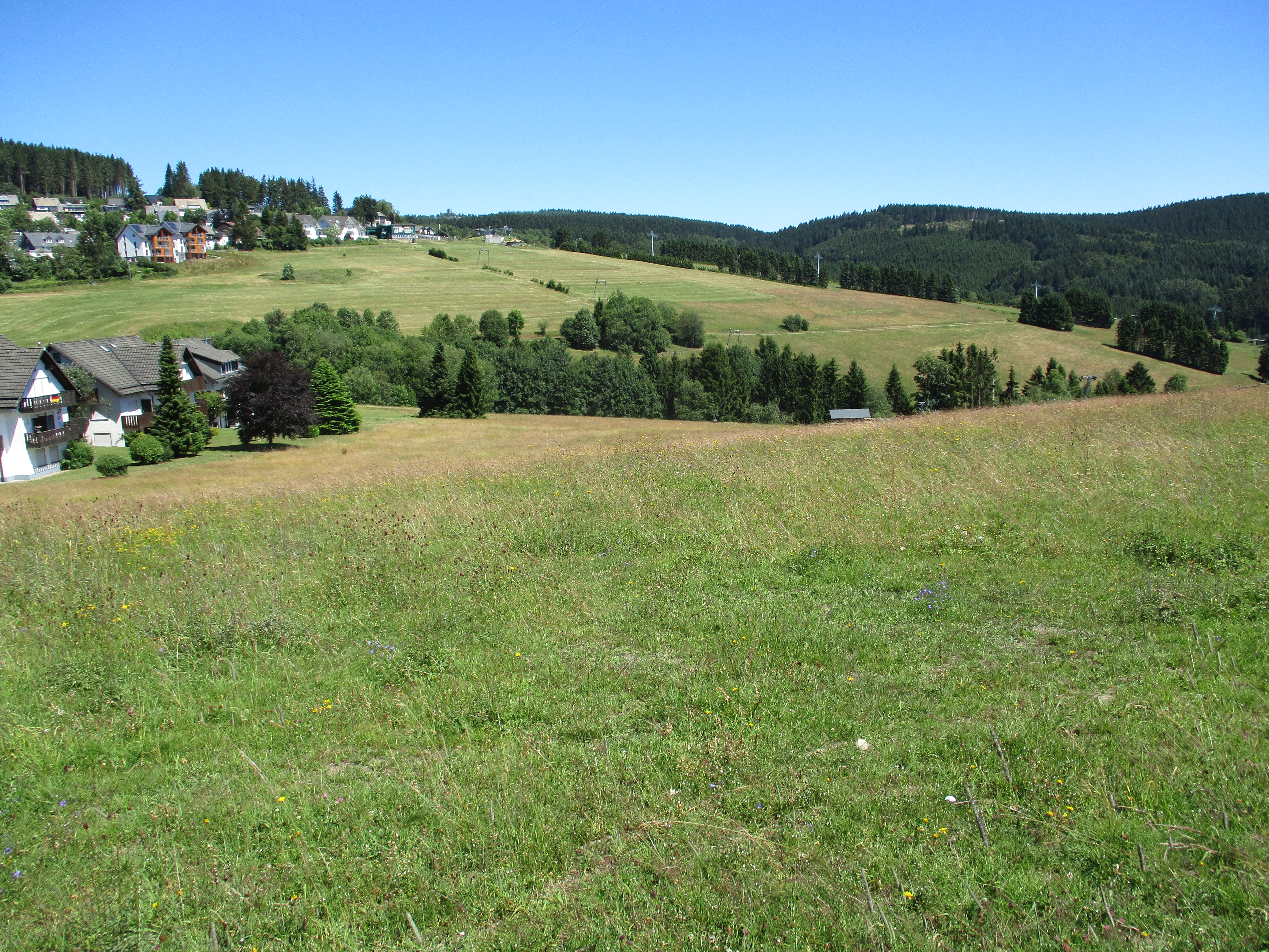 Landschaftsschutzgebiet Postwiese und Magergrünland bei Neuastenberg bzw. FFH-Gebiet Bergwiesen bei Winterberg mit Blick auf Neuastenberg von Süden.